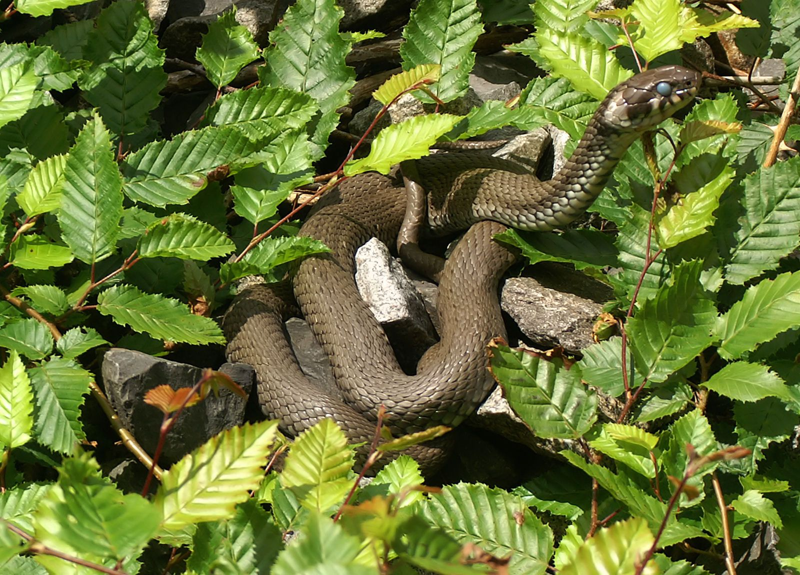 Natrix natrix